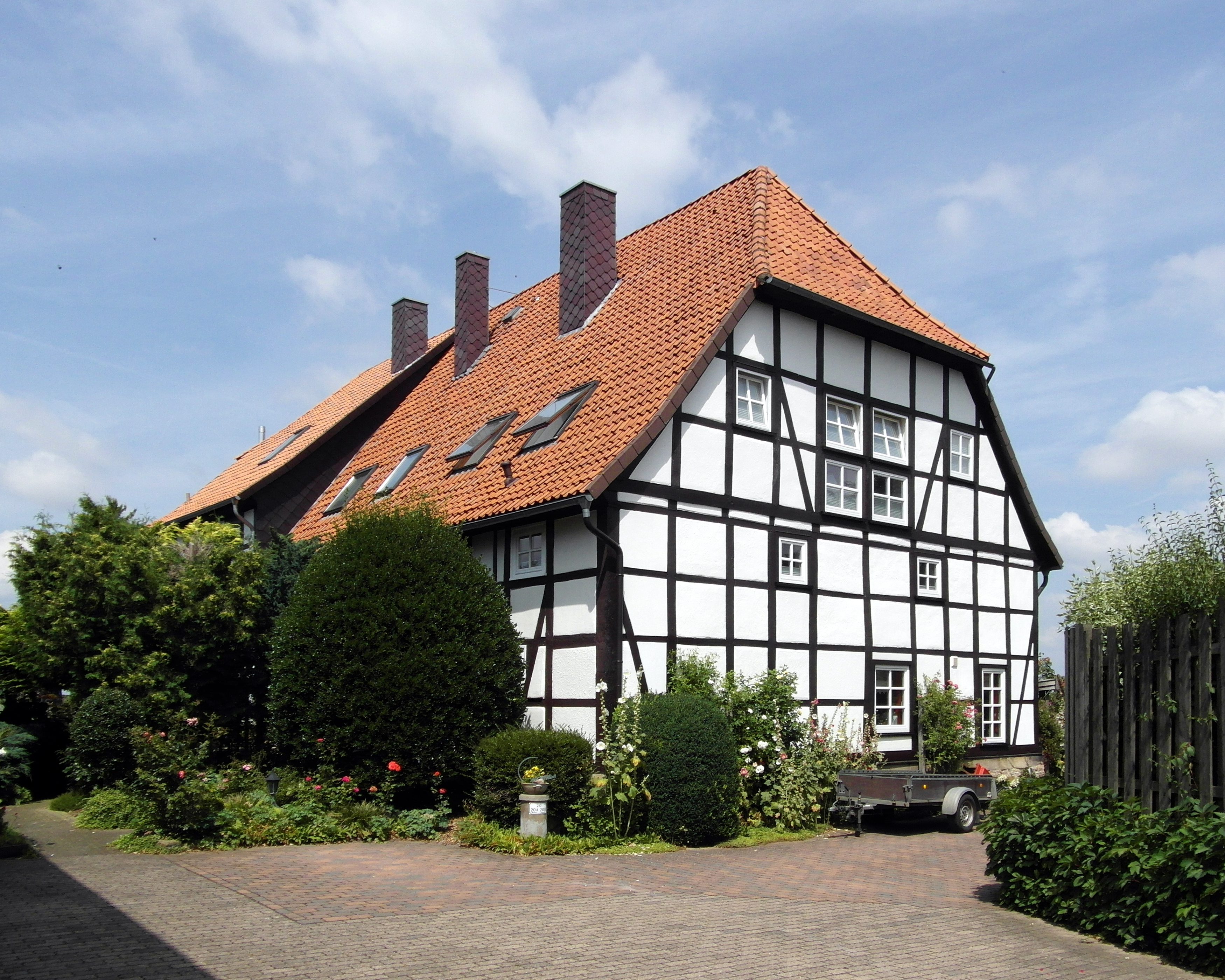 Im Gebäude Stoppstraße 20 im Barsinghäuser Stadtteil Egestorf befand sich bis 1867 die Bergwerksverwaltung für den gesamten Deister. Es wurde im ersten Drittel des 19. Jahrhunderts erbaut. Das Haus wurde auch als Forsthaus genutzt.